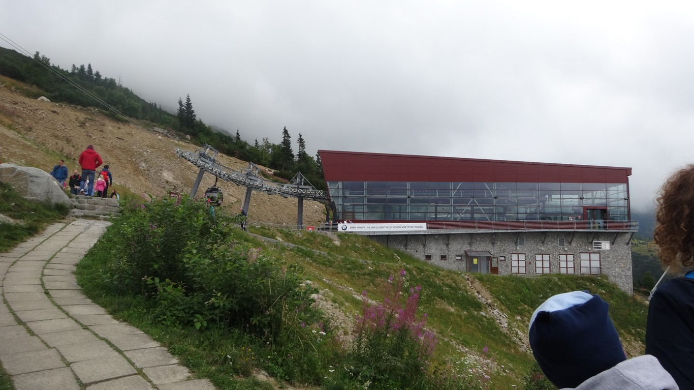 Stanica lanovky na Chopok